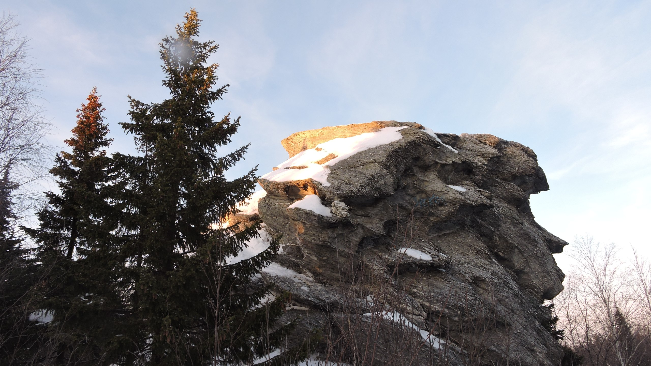 Гора "Старик-камень", Ревда This image is related to the protected area of Russia number 6610554